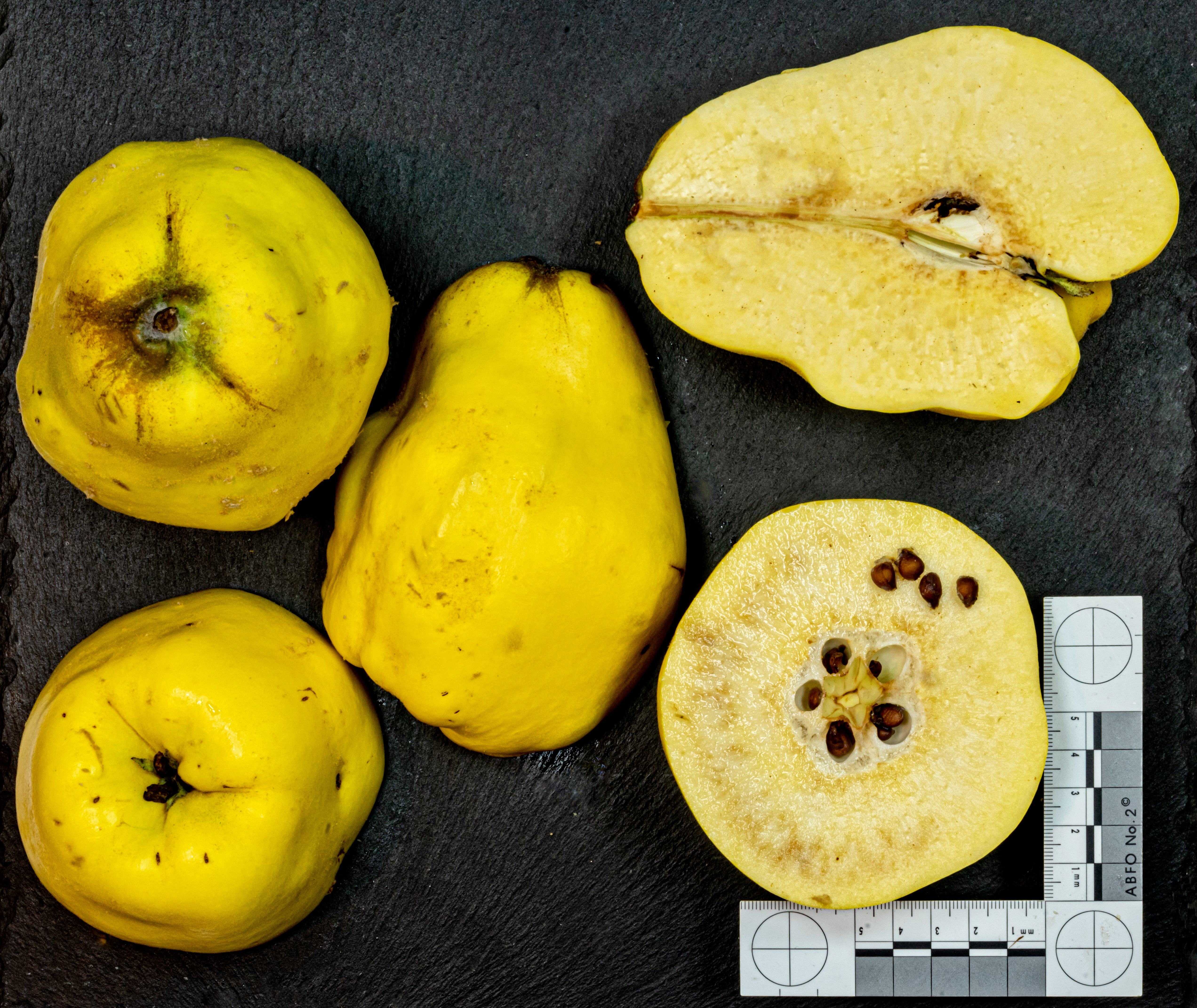 Vranja eine Birnenquitte 1898SerbienZüchter NenadovicDurchmesser erreichen sie sieben bis neun, in der Höhe neun bis elf Zentimeter 300 bis 550 Gramm selten 1000gr Die Früchte - jeweils 5 pro Sorte - wurden mir vom Obsthof Drechsle netterweise kostenlos für die Wikipedia Photographien zur Verfügung gestellt´. Vielen Dank dafür.